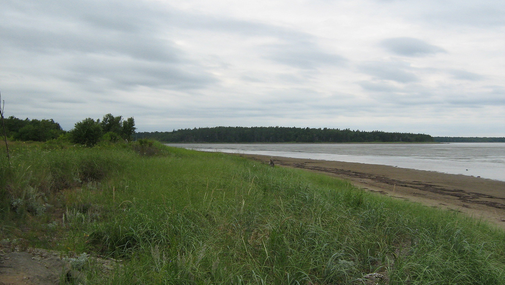 Baie de Kouchibouguac à l'embouchure de la de la rivière Kouchibouguac.